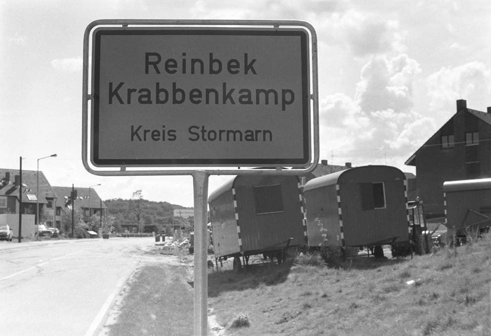 Orteingang Krabbenkamp, Reinbek, August 1981